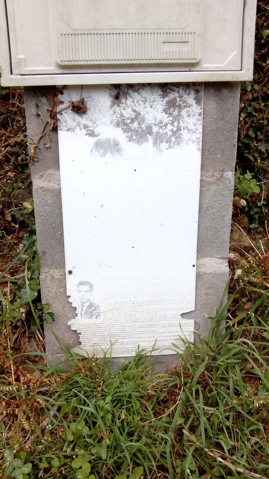 Homenaxe a Foucellas na Costa Oza Cesuras, A Coruña.